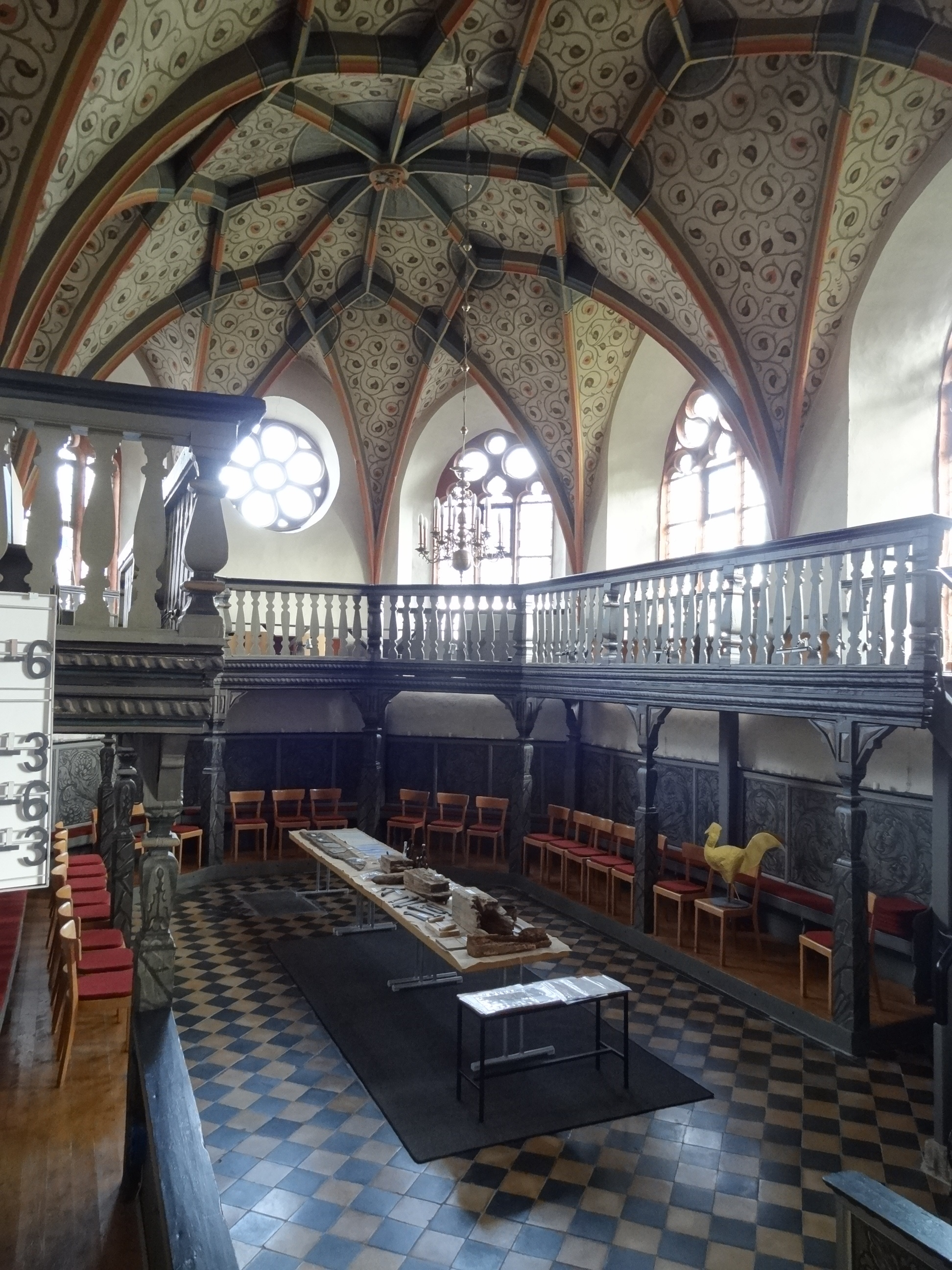 Ev. ref. Kirche Grüningen